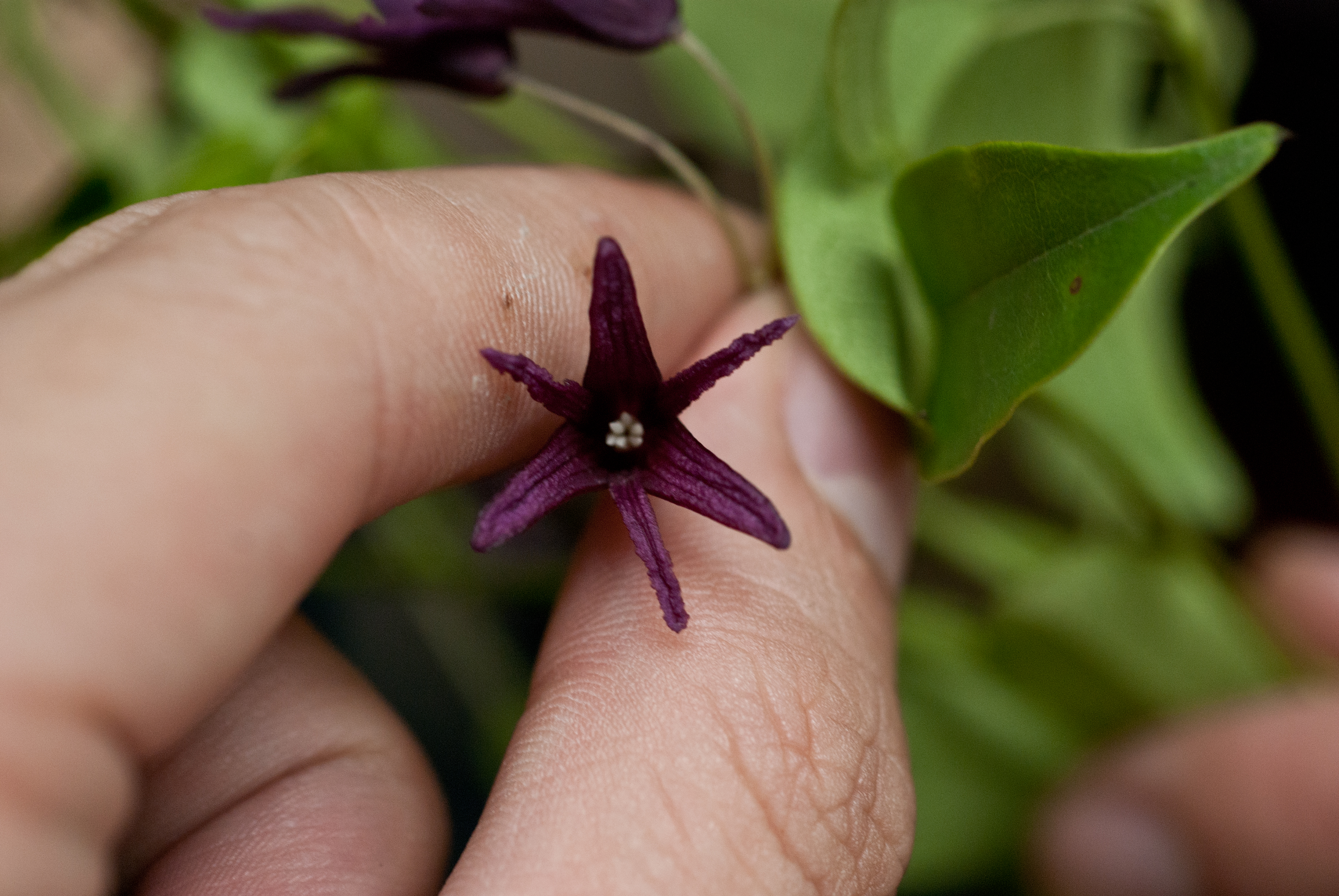 Lardizabalaceae, Stauntonia, Stauntonia purpurea Y. C. Liu & F. Y. Lu, 木通科, 紫花野木瓜, 野木瓜屬